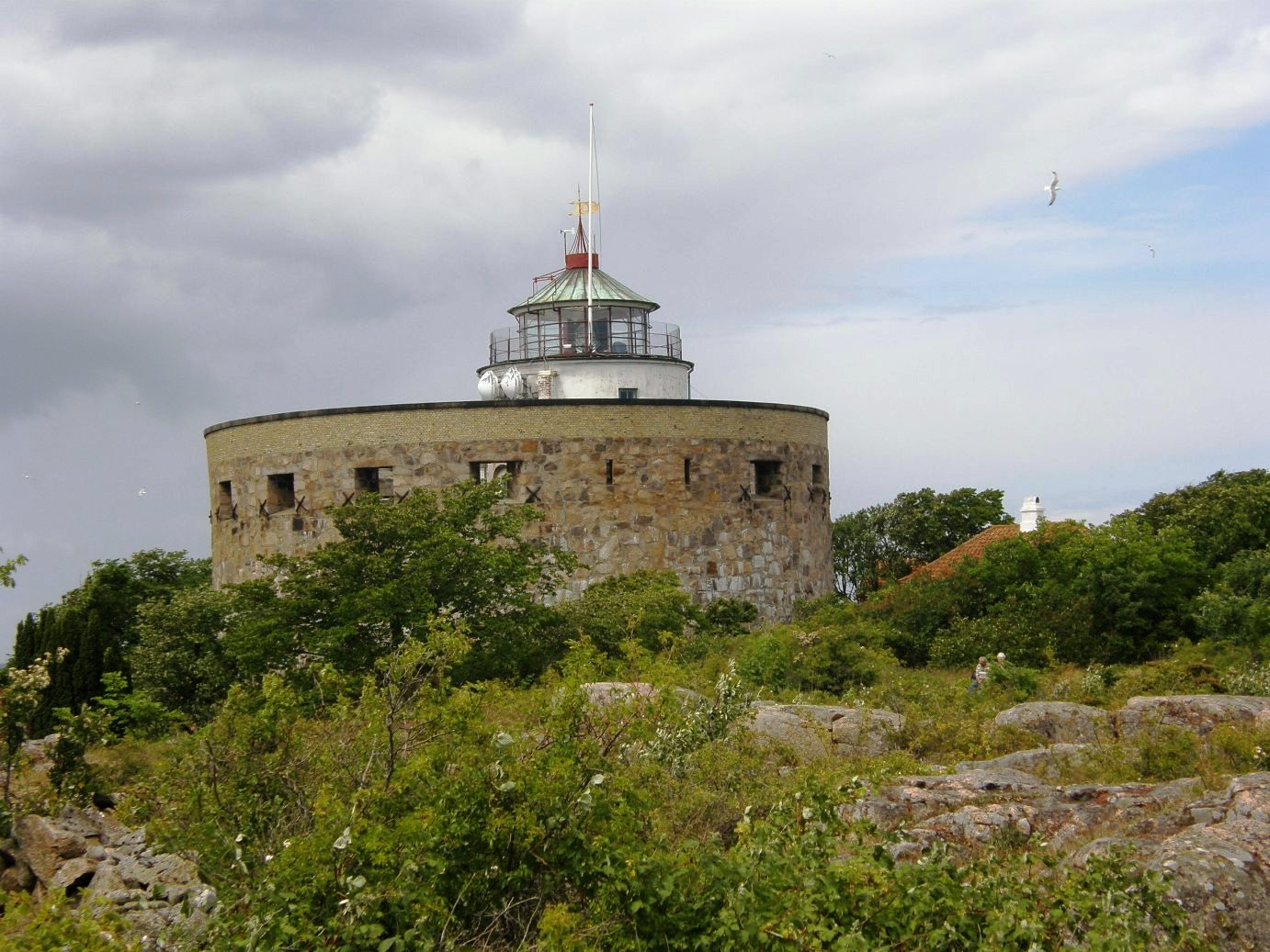 Duża Wieża z latarnią morską